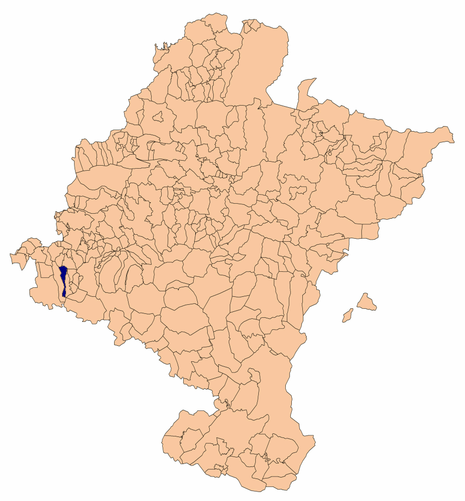 Armañanzas